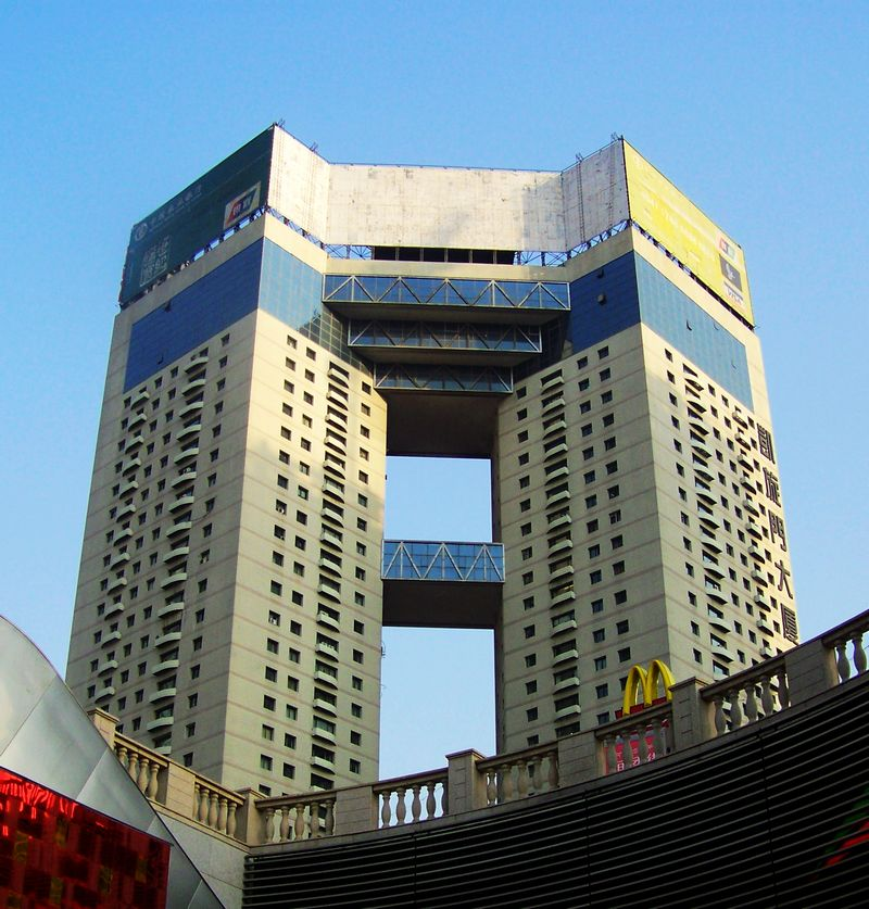 天津凯旋门大厦